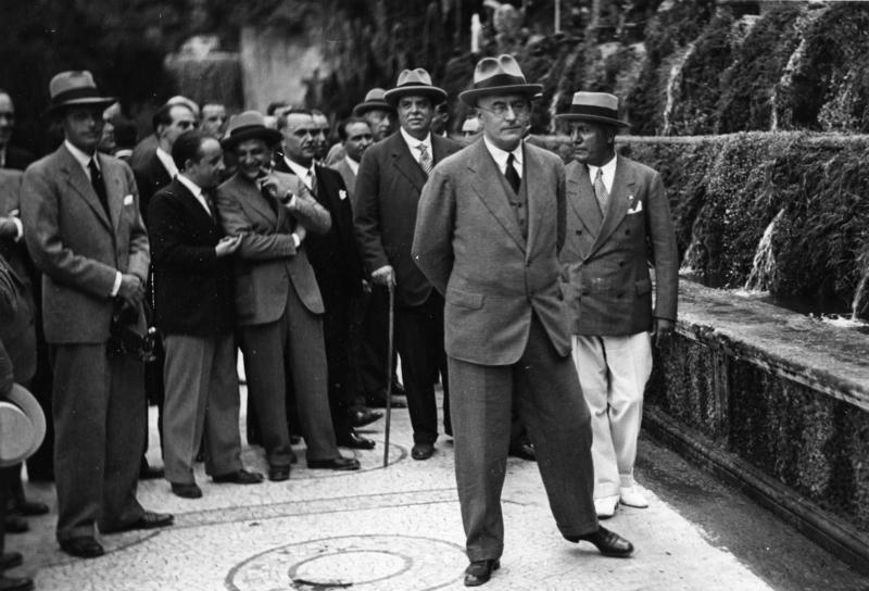 Rom, Deutscher Staatsbesuch, Brüning In der Villa d'Este Orsini Baroni, Dr. Brüning, Mussolini 25617-31 [Rom.- Deutscher Staatsbesuch, im Garten der Villa d'Este in Tivoli bei Rom, im Vordergrund Reichskanzler Heinrich Brüning, links dahinter Luca Orsini Baroni, rechts Benito Mussolini.] Abgebildete Personen: Brüning, Heinrich Dr.: Reichskanzler, Zentrum, Deutschland Orsini Baroni, Luca: Botschafter in Deutschland, Italien (GND 117147540) Mussolini, Benito: Ministerpräsident, Regierungschef, Chef des Faschistischen Großrates, Italien Information added by Wikimedia users.*